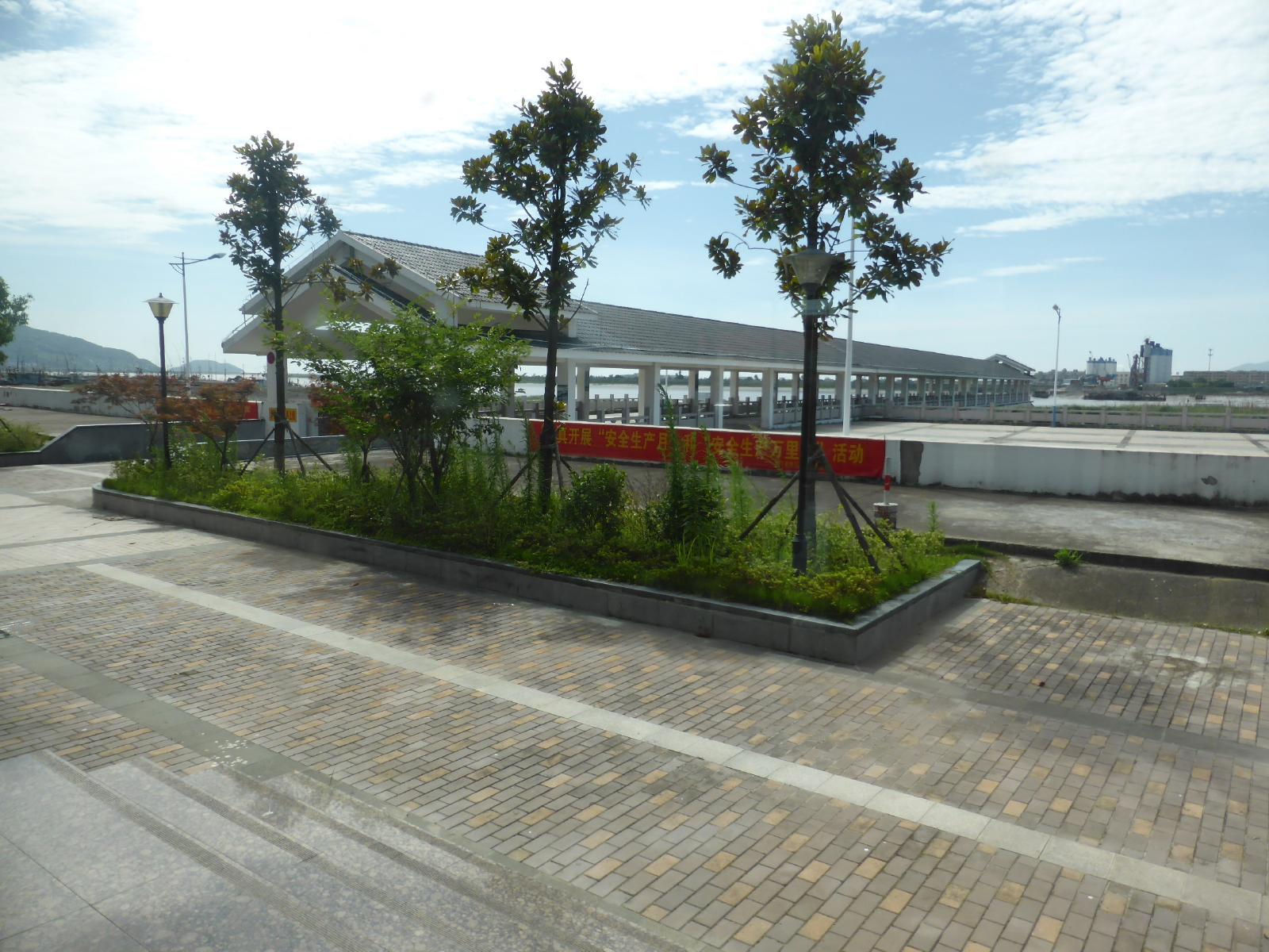 チケット購入後X線審査を受けて桟橋へ行く